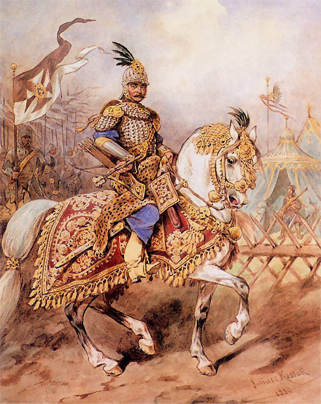 Rittmeister, nach Juliusz Kossak (Historienmaler), der Schweren Reiterei, 1886.